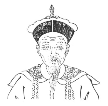 徐有壬（1800年－1860年），字君青，一字钧卿，浙江乌程（今湖州）人，道光九年（1829年）进士，官至江苏巡抚。